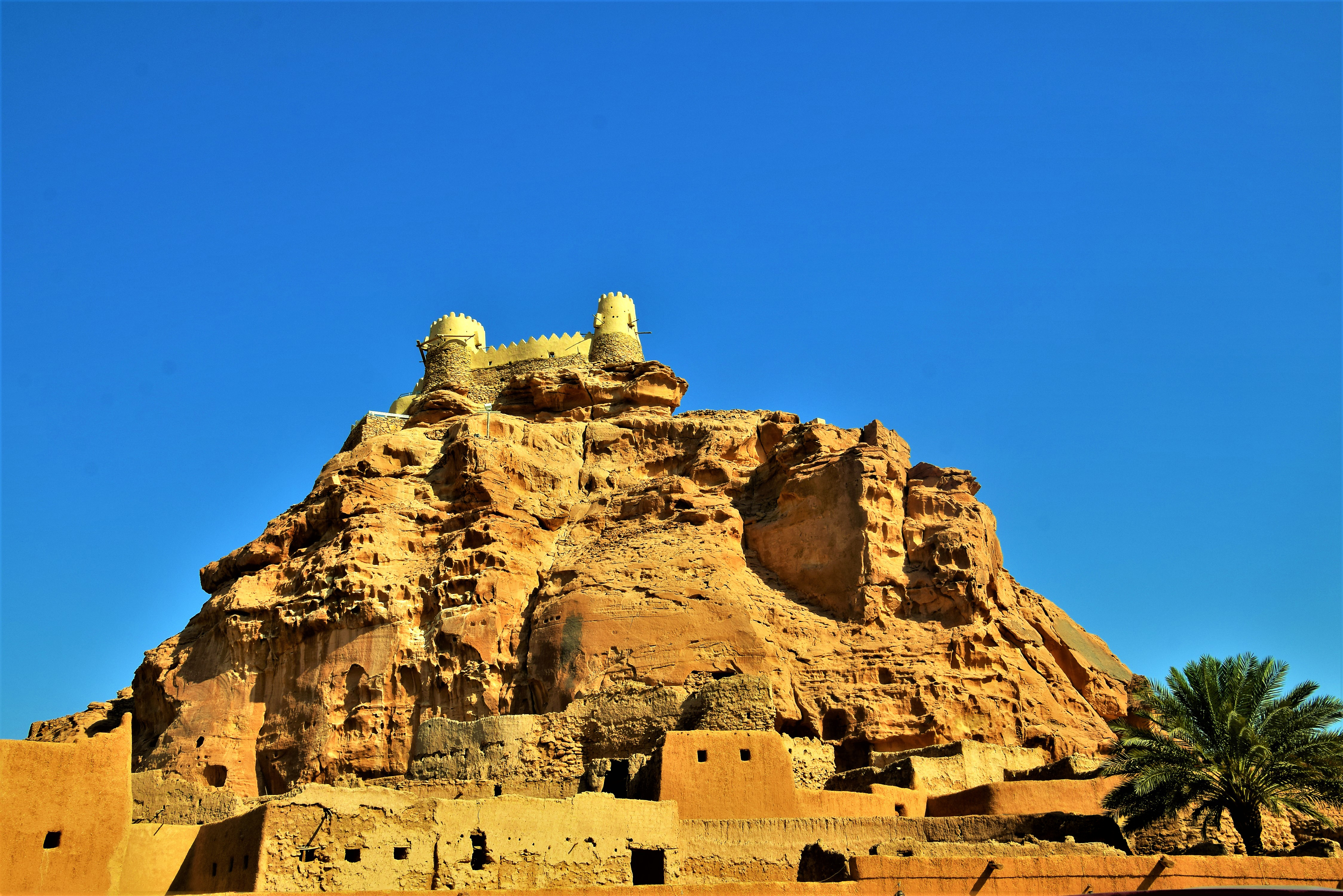 صورة لقصر زعبل تمثل تاريخ وحضارة واثار وتراث المملكة